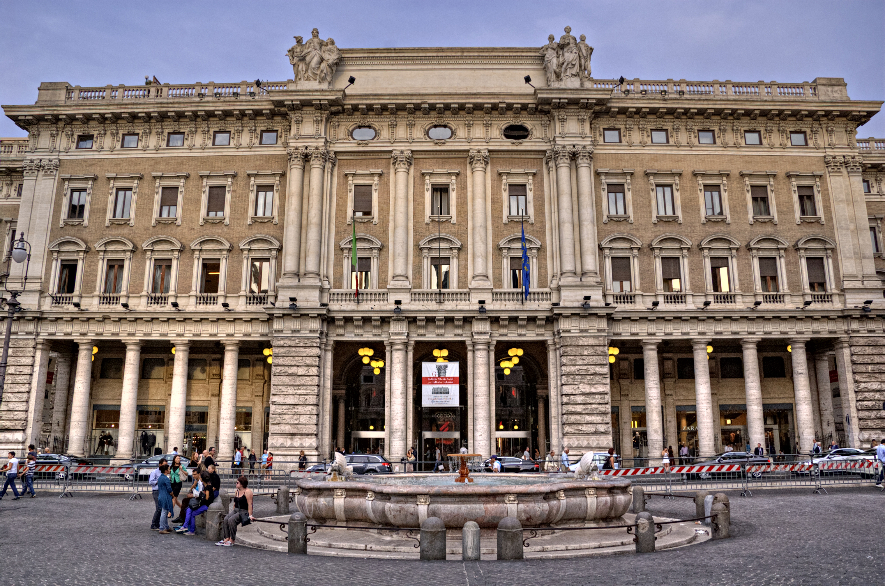 Galleria Alberto Sordi (già Galleria Colonna) This is a photo of a monument which is part of cultural heritage of Italy.